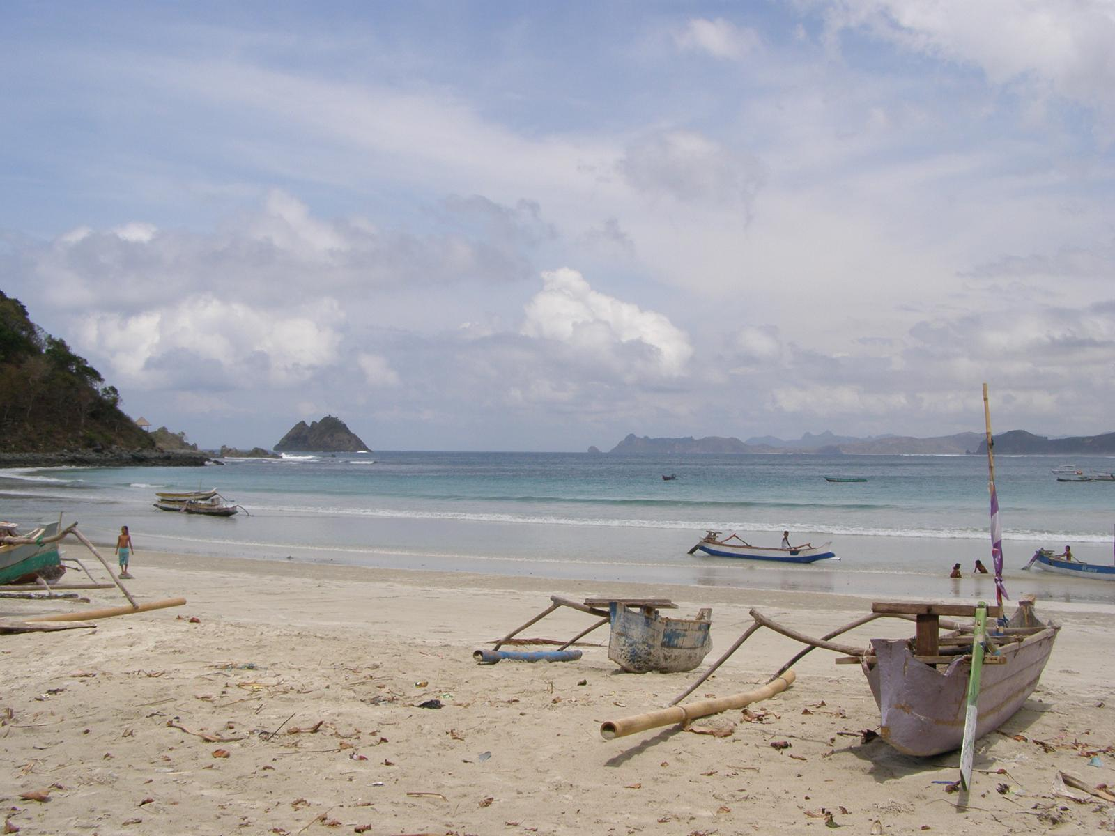 La plage de Selong Blanak.